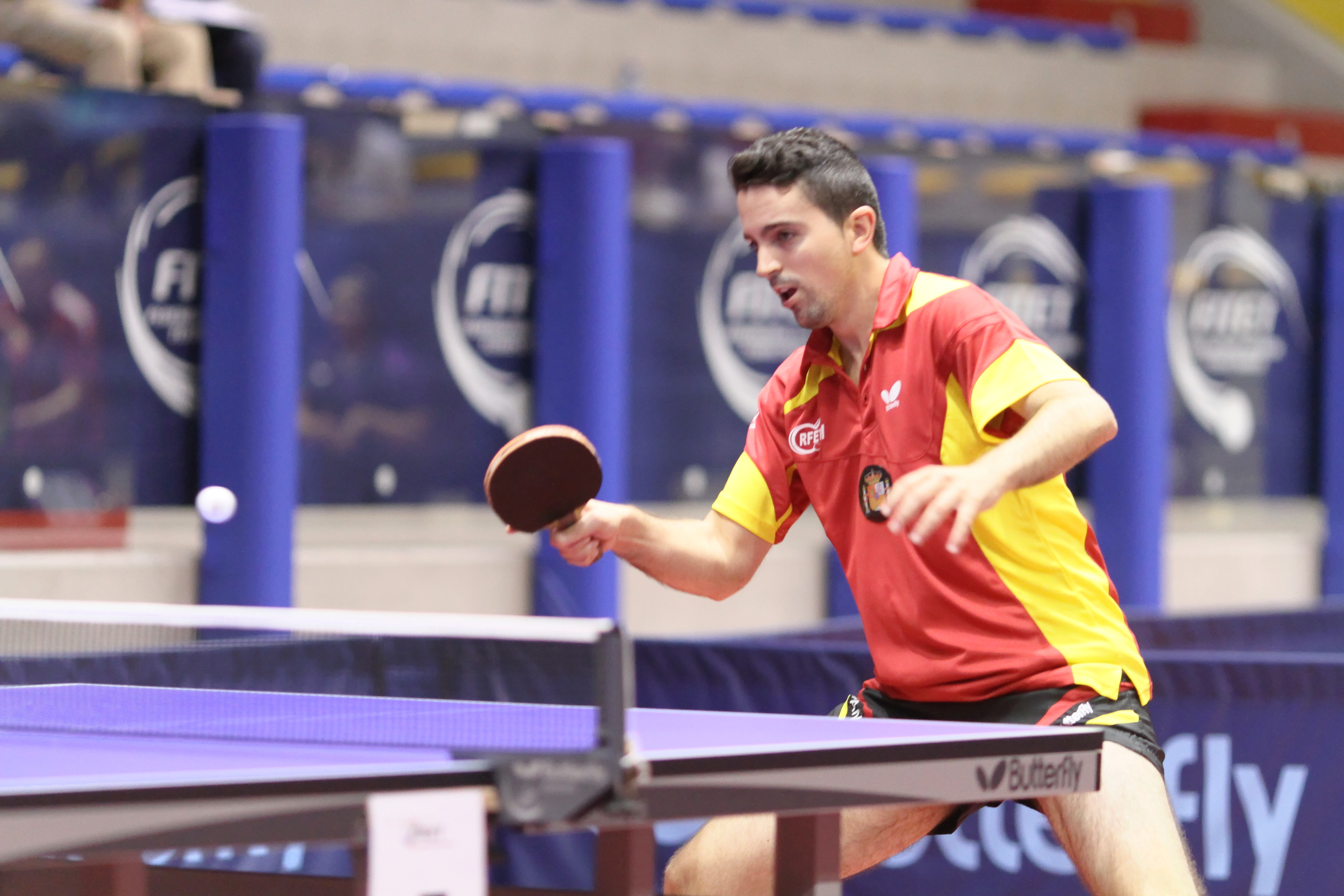 CARDONA Jorge (ESP) IMG_1640_DxO